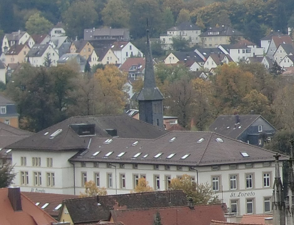 Schwäbisch Gmünd: St. Loreto